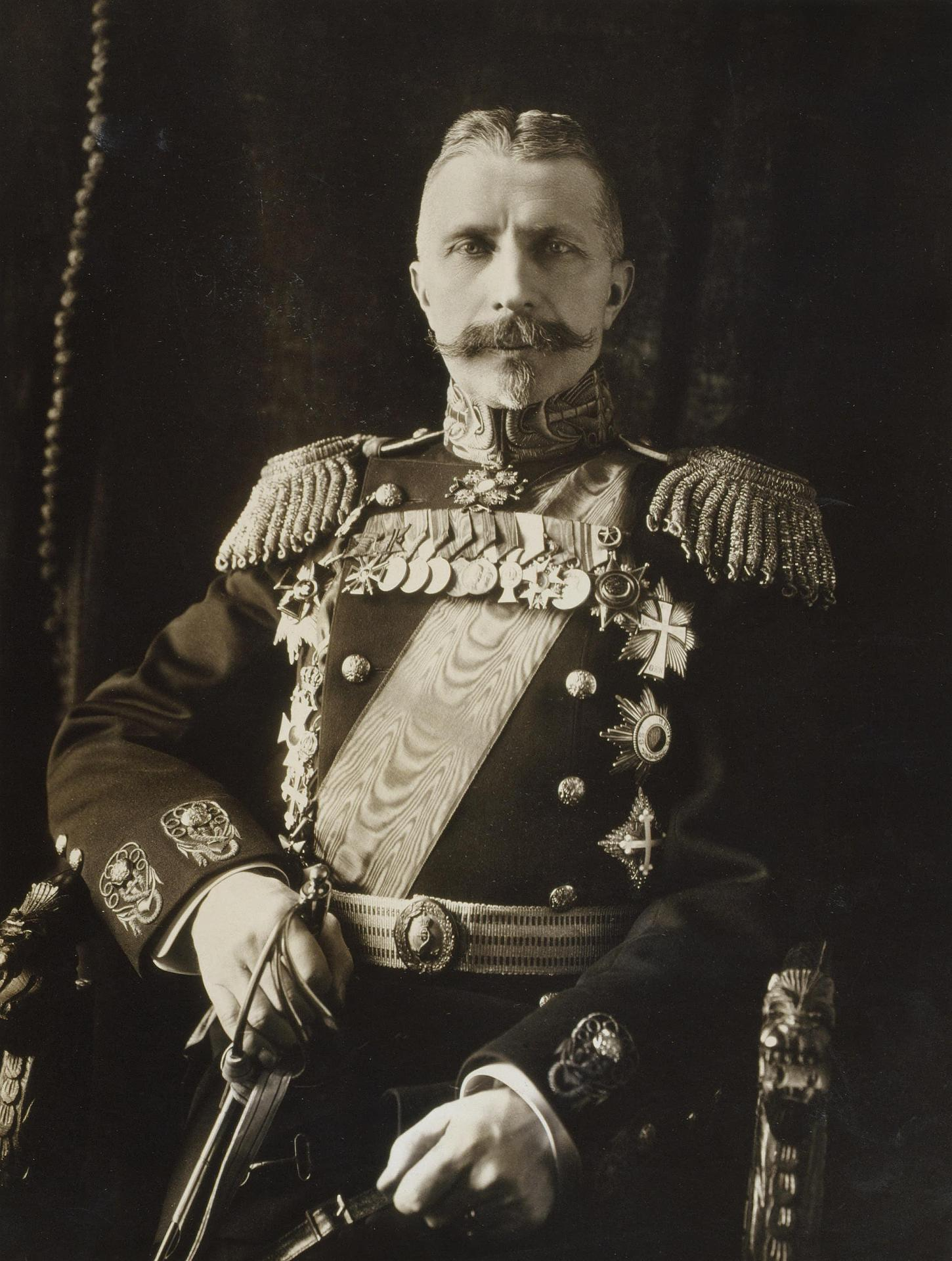 Портрет адмирала Александра Ивановича Русина. Фотография: бромсеребряный отпечаток. 23,8х17,8 см